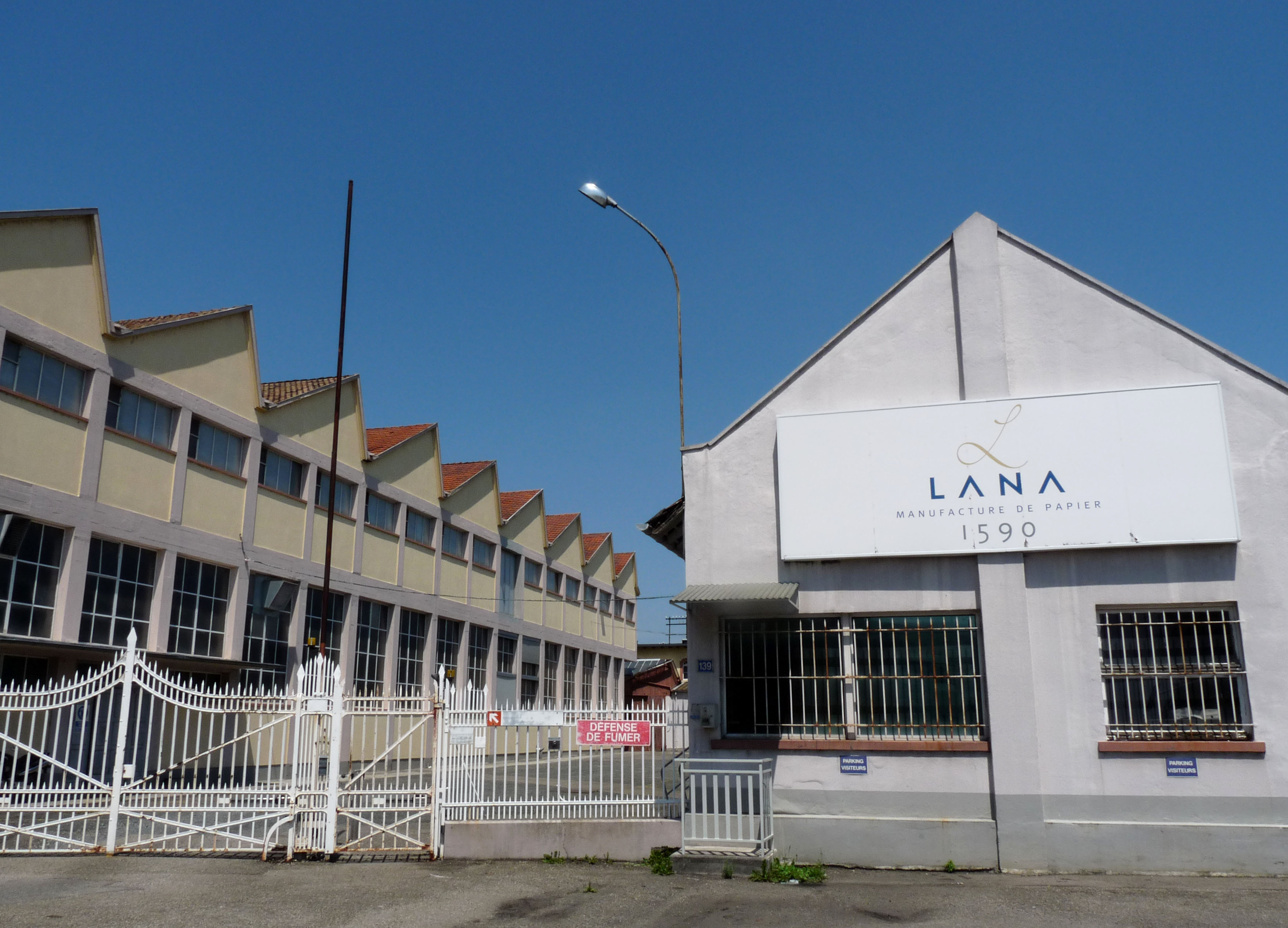 Manufacture de papier Lana à la Robertsau (Strasbourg). Fondée en 1590, rachetée par Hahnemühle (All.)